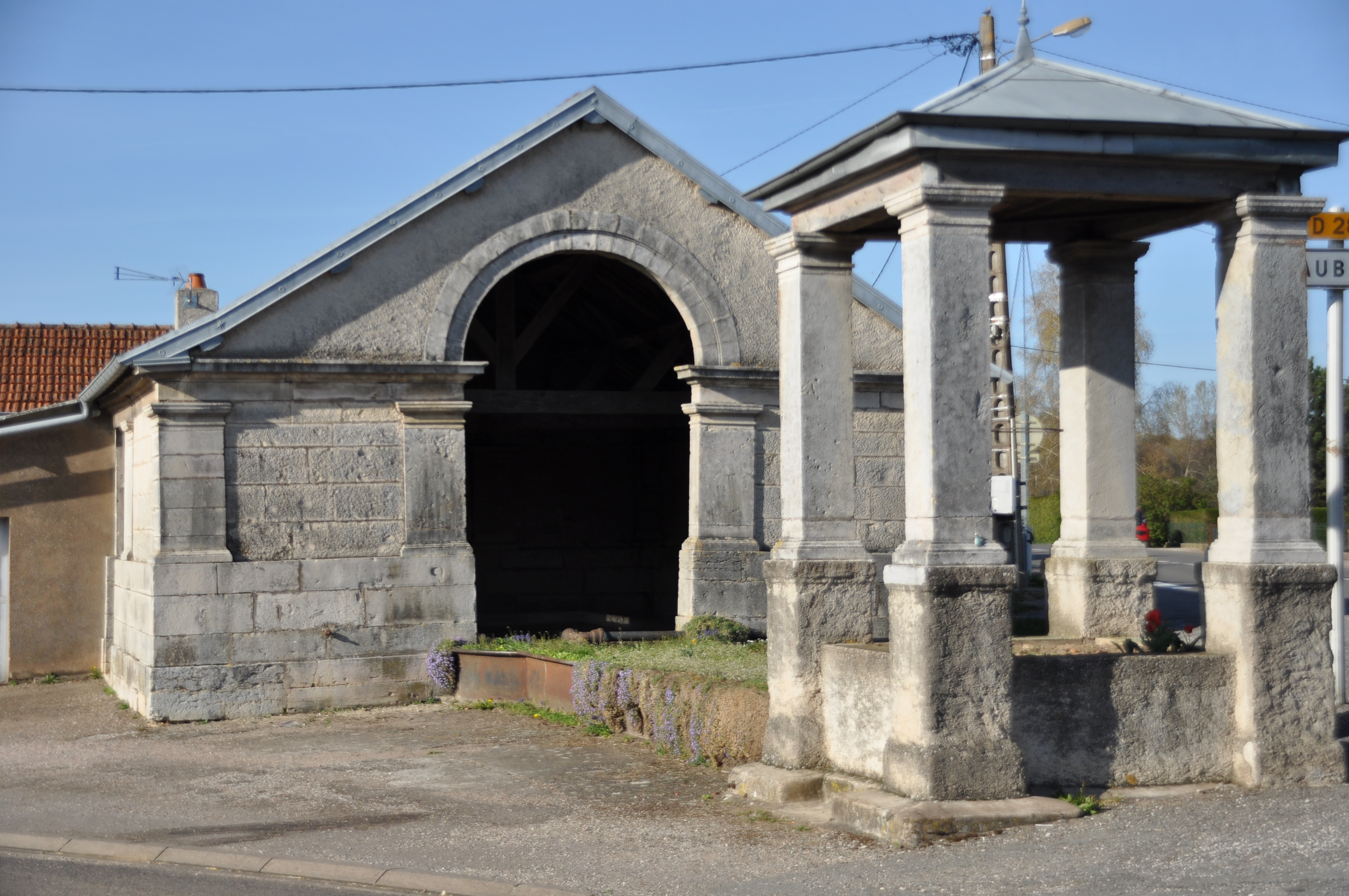 Sauvigney-lès-Pesmes - lavoir et fontaine